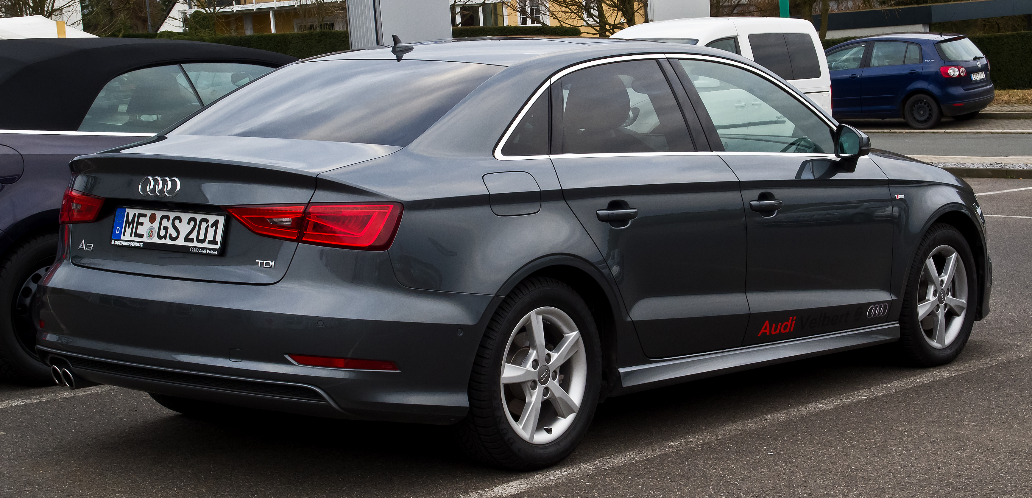 Audi A3 Limousine 2.0 TDI Ambiente S-line (8V)